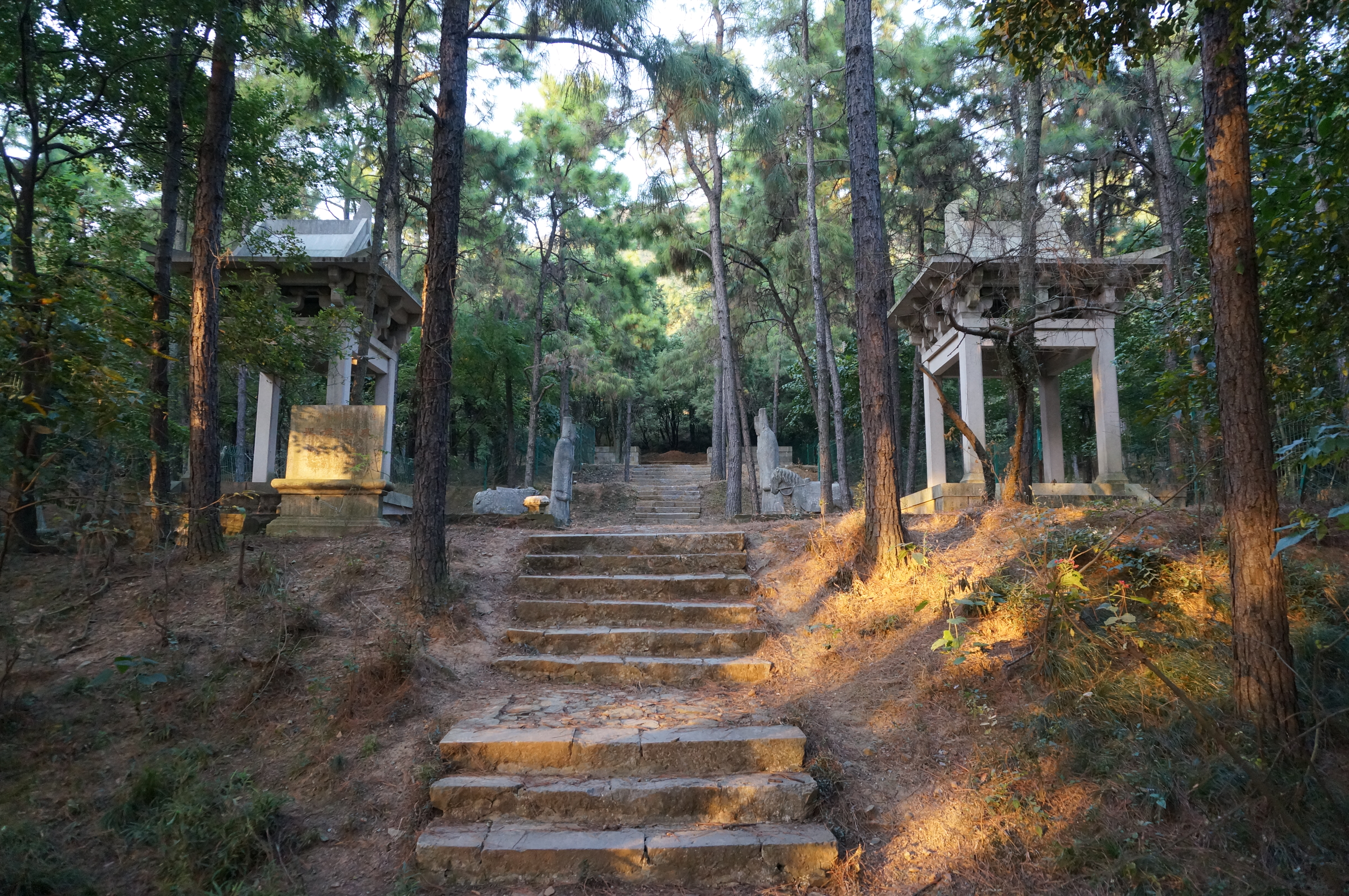 瞿景淳墓，石亭之前看墓道。